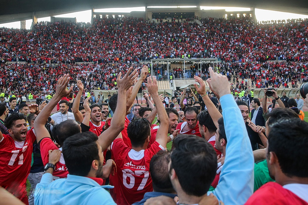 مازِرونی: نساجی و راه آهن خجیر کا